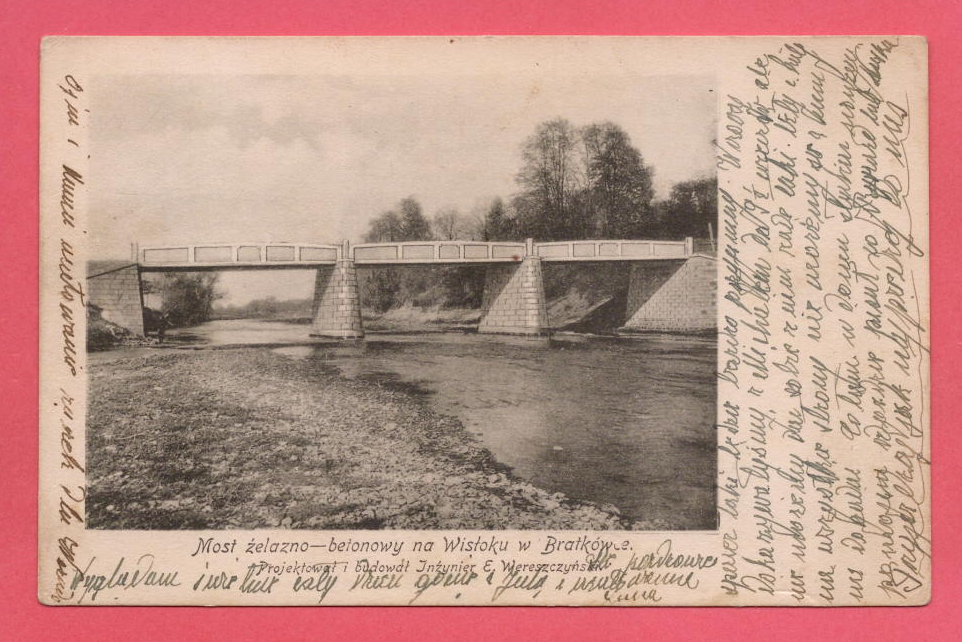 Most żelazno-betonowy na Wisłoku w Bratkówce. Projektował i budował inżynier E. Wereszczyński.